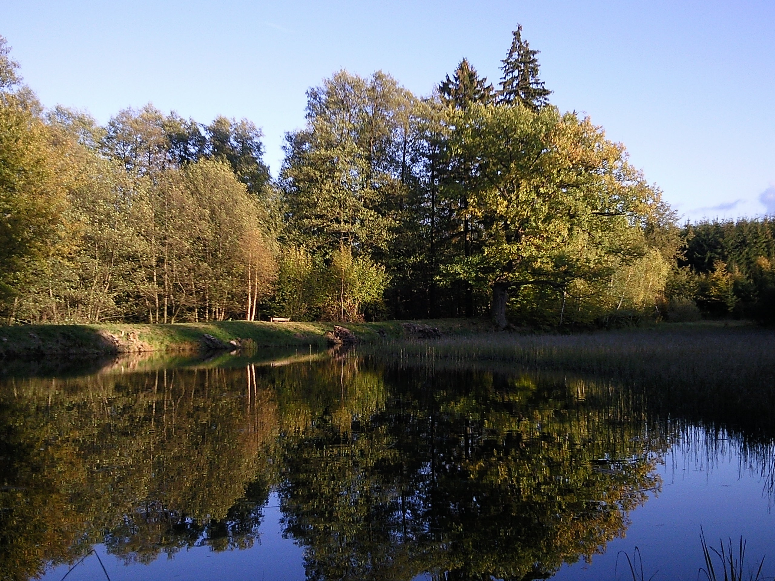 Möllerteich im Herbst 2011